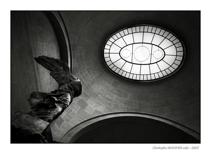 Niké en chiton ionique - Victoire de Samothrace - Musée du Louvre, Paris.